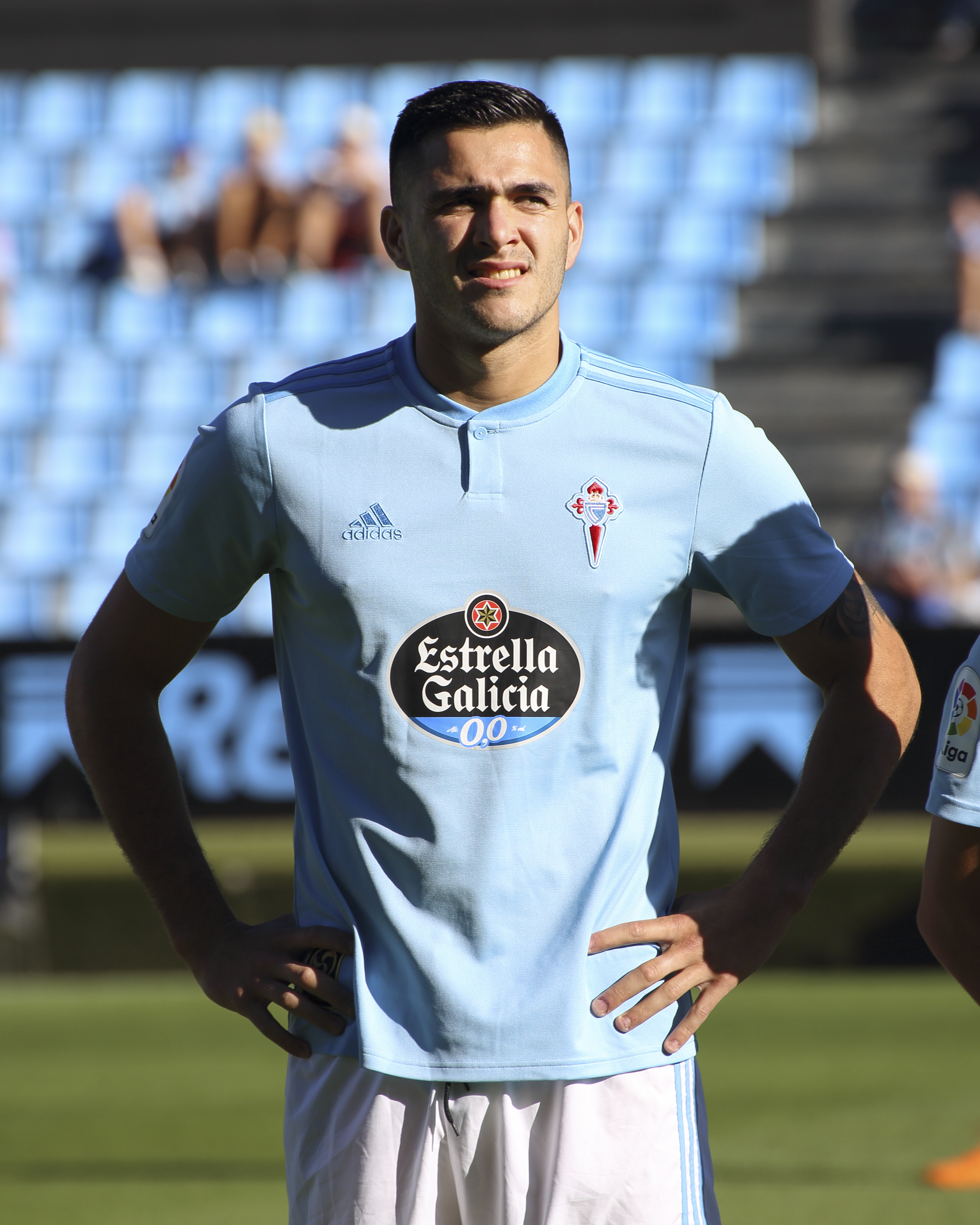 Presentación RC Celta - Temporada 18/19